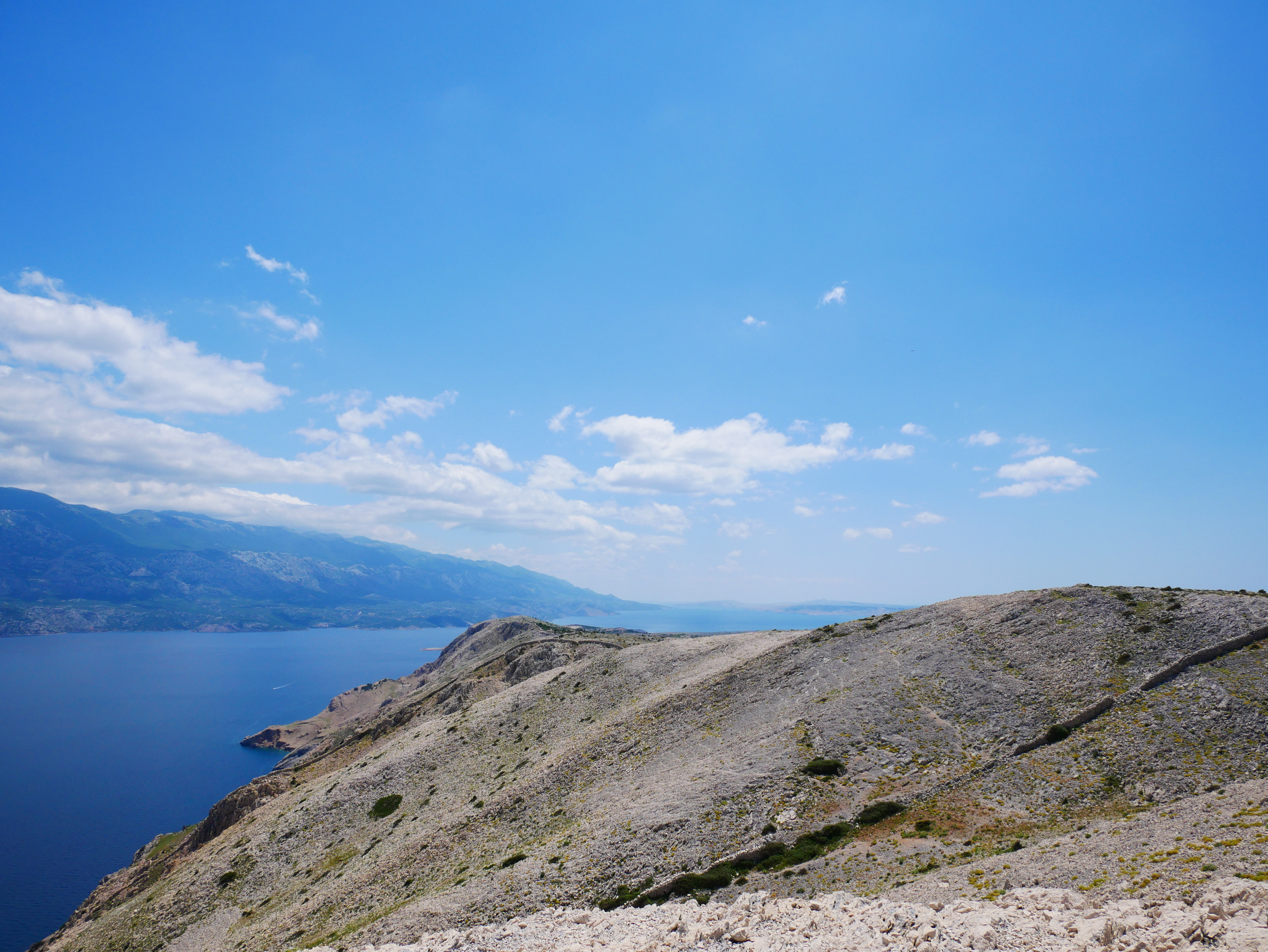 Pogled prema uvali Mag.